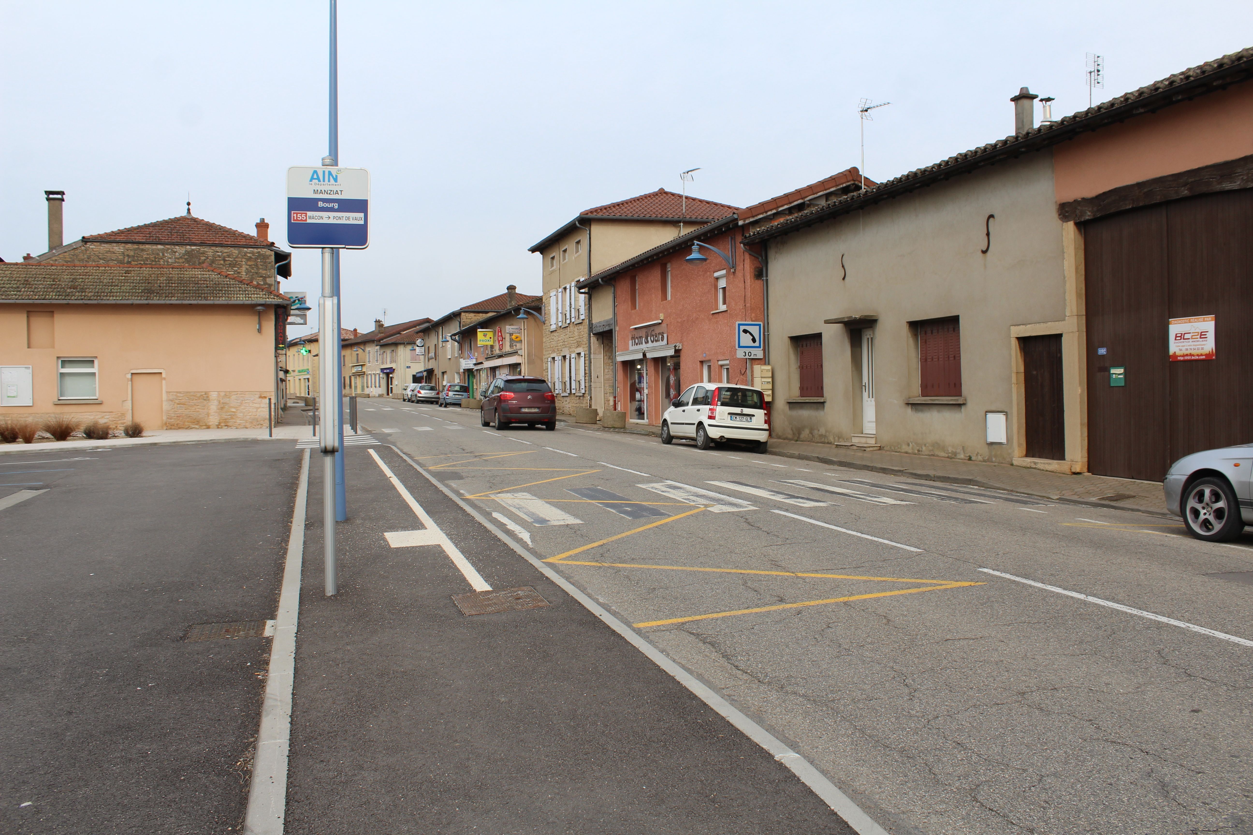 Arrêt de bus Bourg à Manziat sur la ligne 155 de .